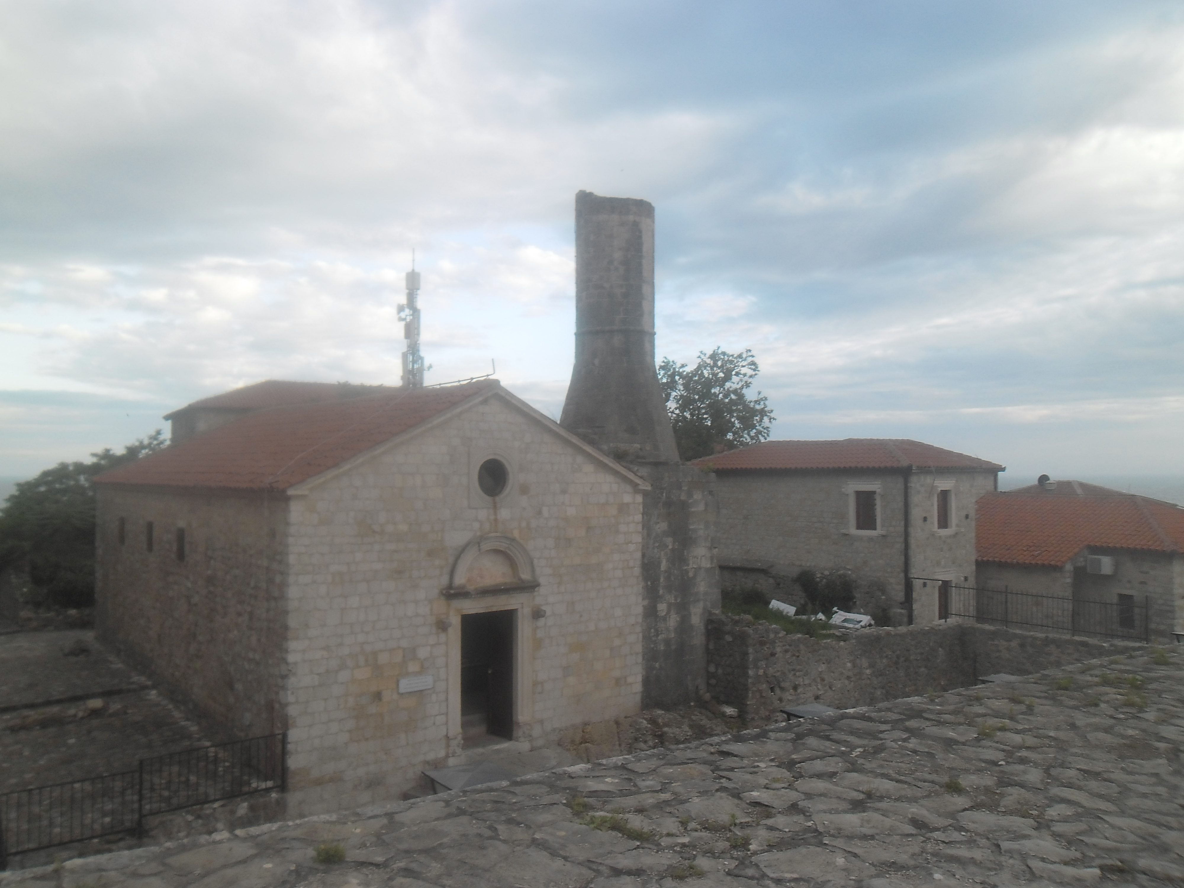 Ulcinj